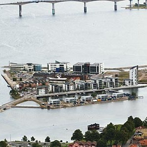 varvsholmen, kalmar